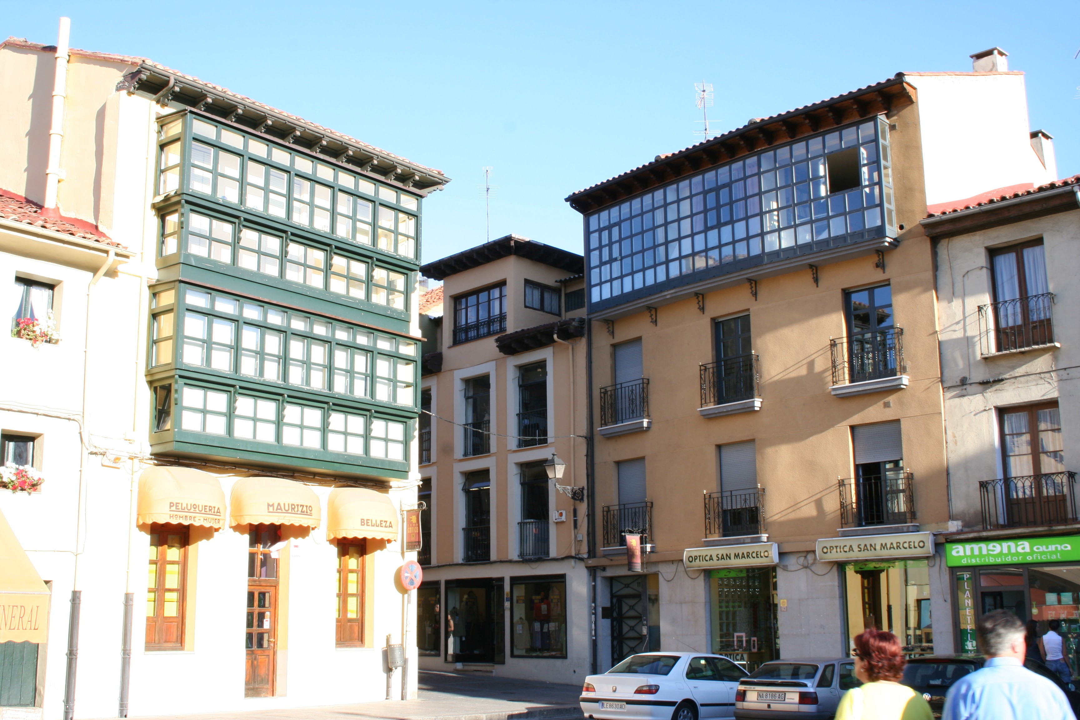 Casa con corredores acristalados, típicos